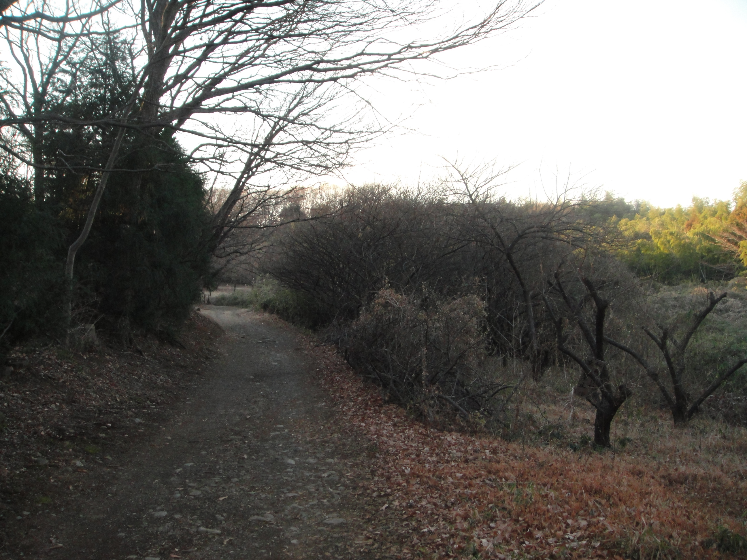 大塚山公園